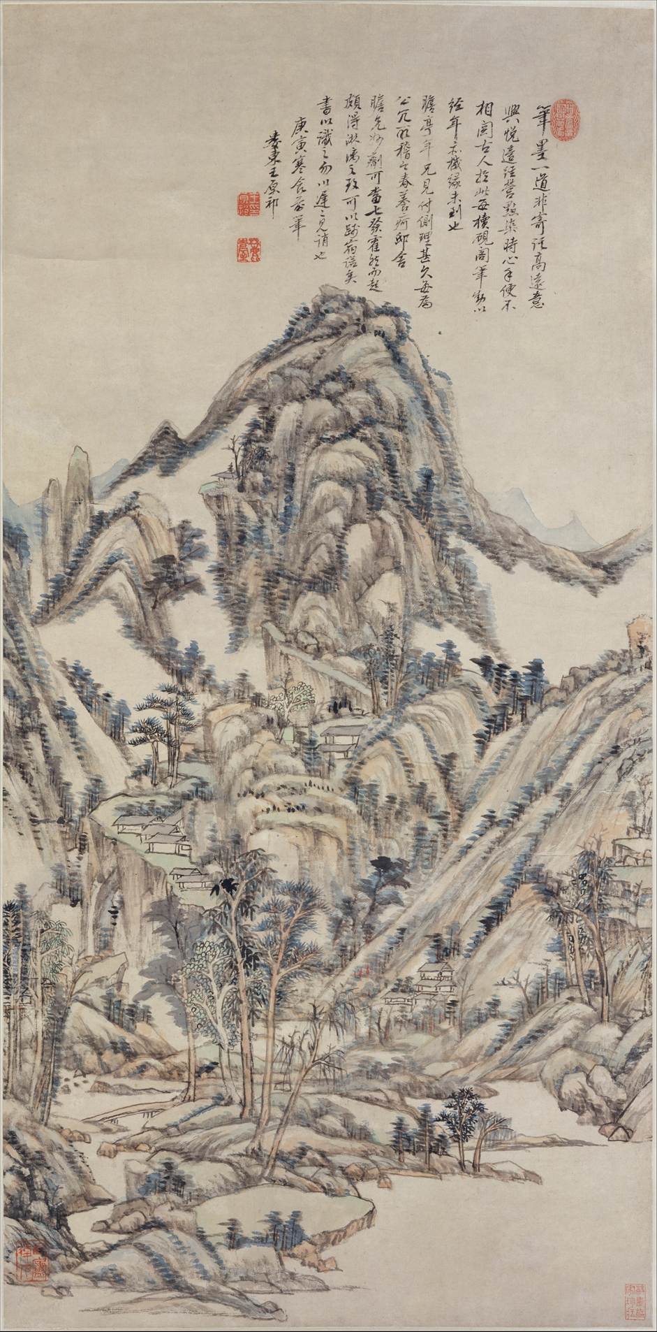 China; Hanging scroll; Paintings